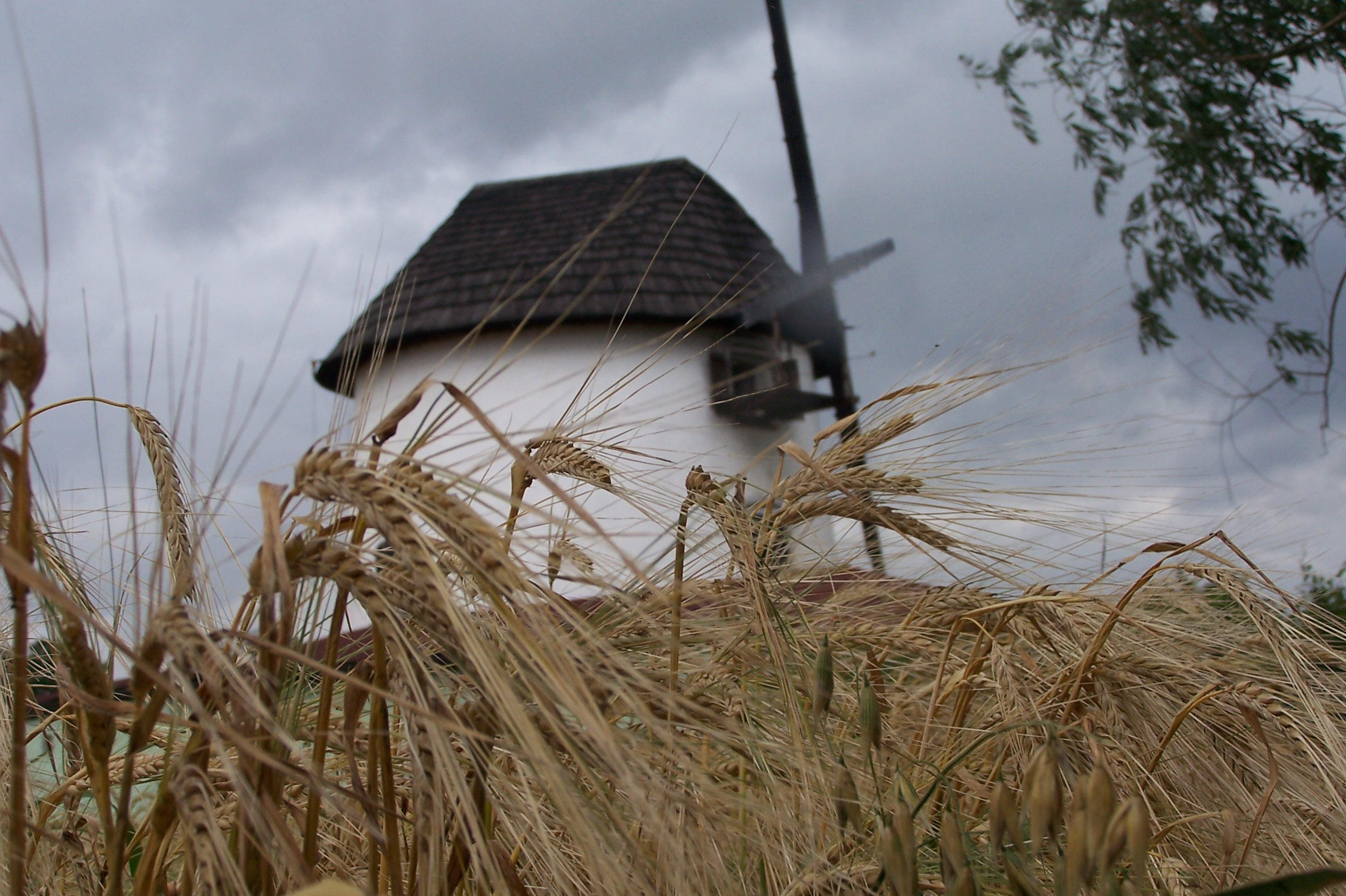 Wiatrak w stylu holenderskim w miejscowości Gogołów